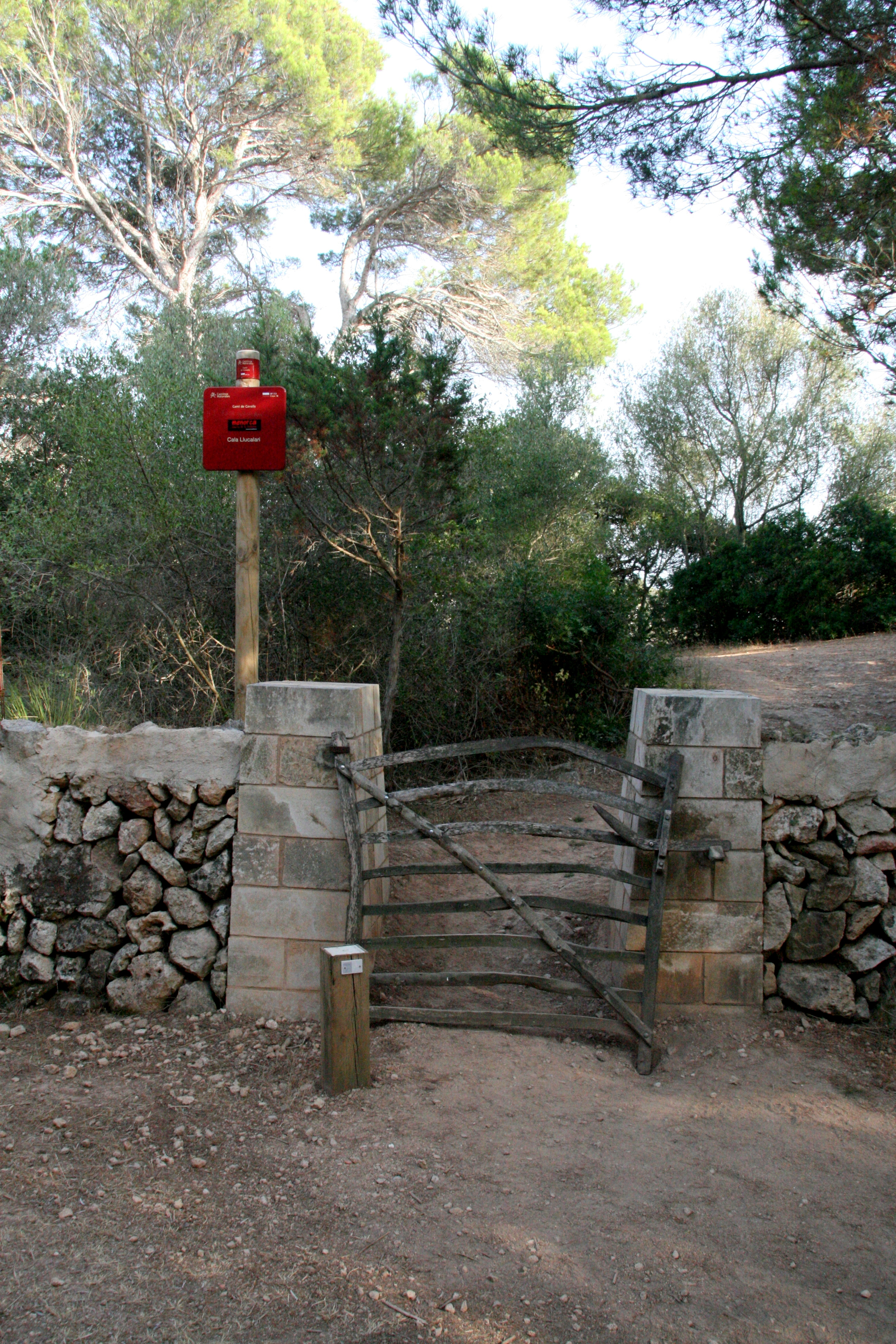 Indicación del camí de Cavalls señalizando el acceso cala Llucalari (etapa 16) This is a photography of a Special Area of Conservation in Spain with the ID: ES0000238. Natura2000 entry, EEA entry